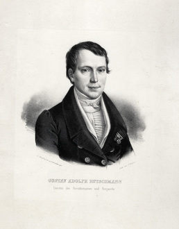 Porträt des Gustav Adolph von Rutschmann (* 9. Januar 1793 in Rodalben (Pfalz); † 23. Januar 1845 in Karlsruhe) war ein deutscher Ministerialbeamter und Direktor der Vereinigten Forsten und Bergwerke in Baden.